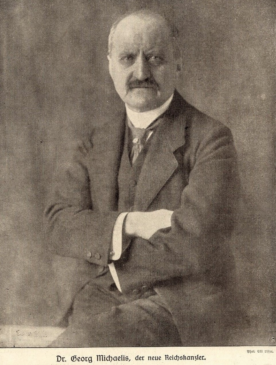 Dr. Georg Michaelis, der neue Reichskanzler, 1917